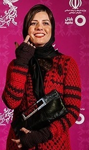 افتتاحیه سی و چهارمین جشنواره فیلم فجر